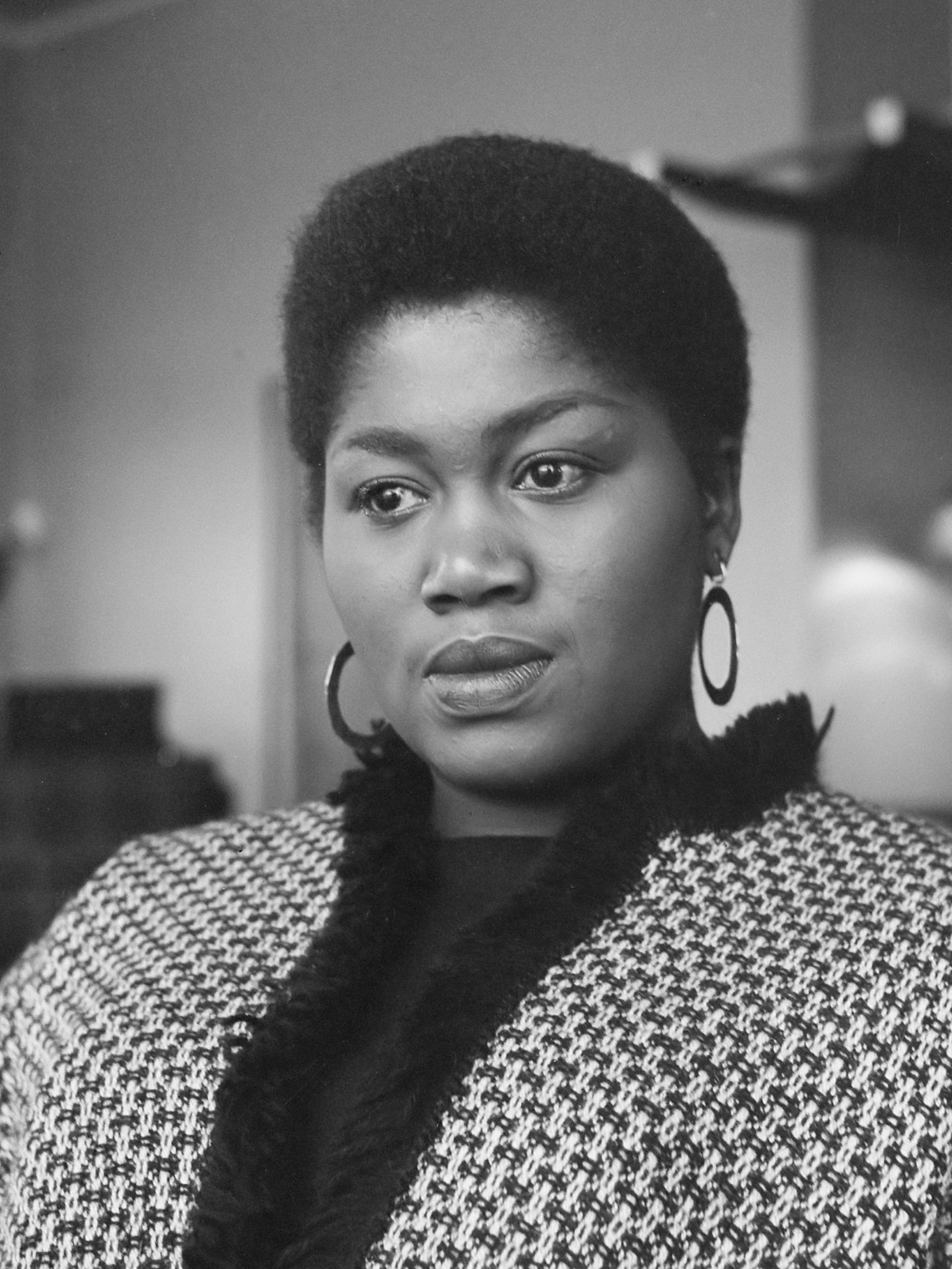 Odette, gospelzangeres in Amsterdam. Portret 4 december 1961